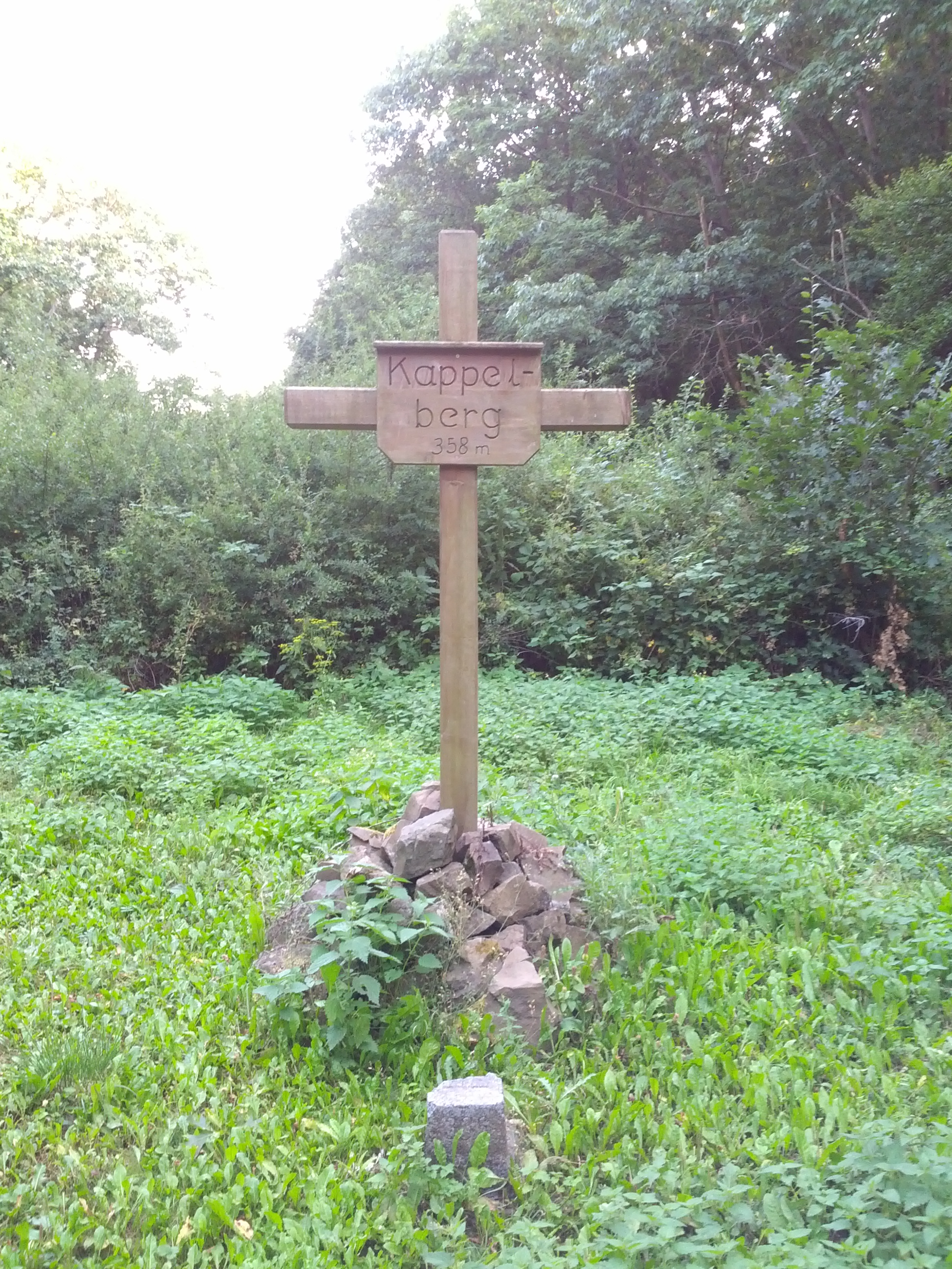 Gipfelkreuz des 358 Meter hohen Kappelberg in Rheinhessen/Deutschland.